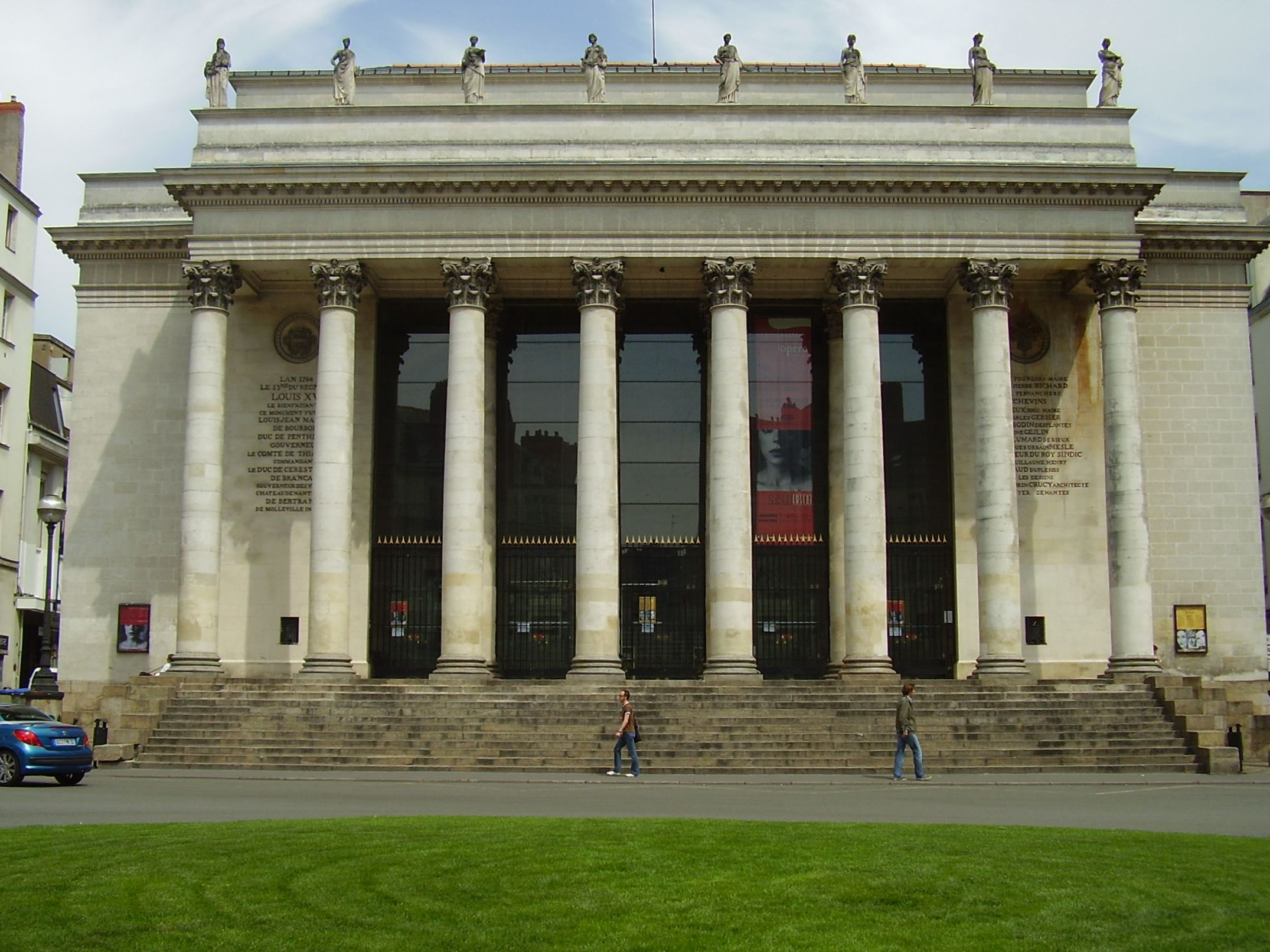 Nantes, France